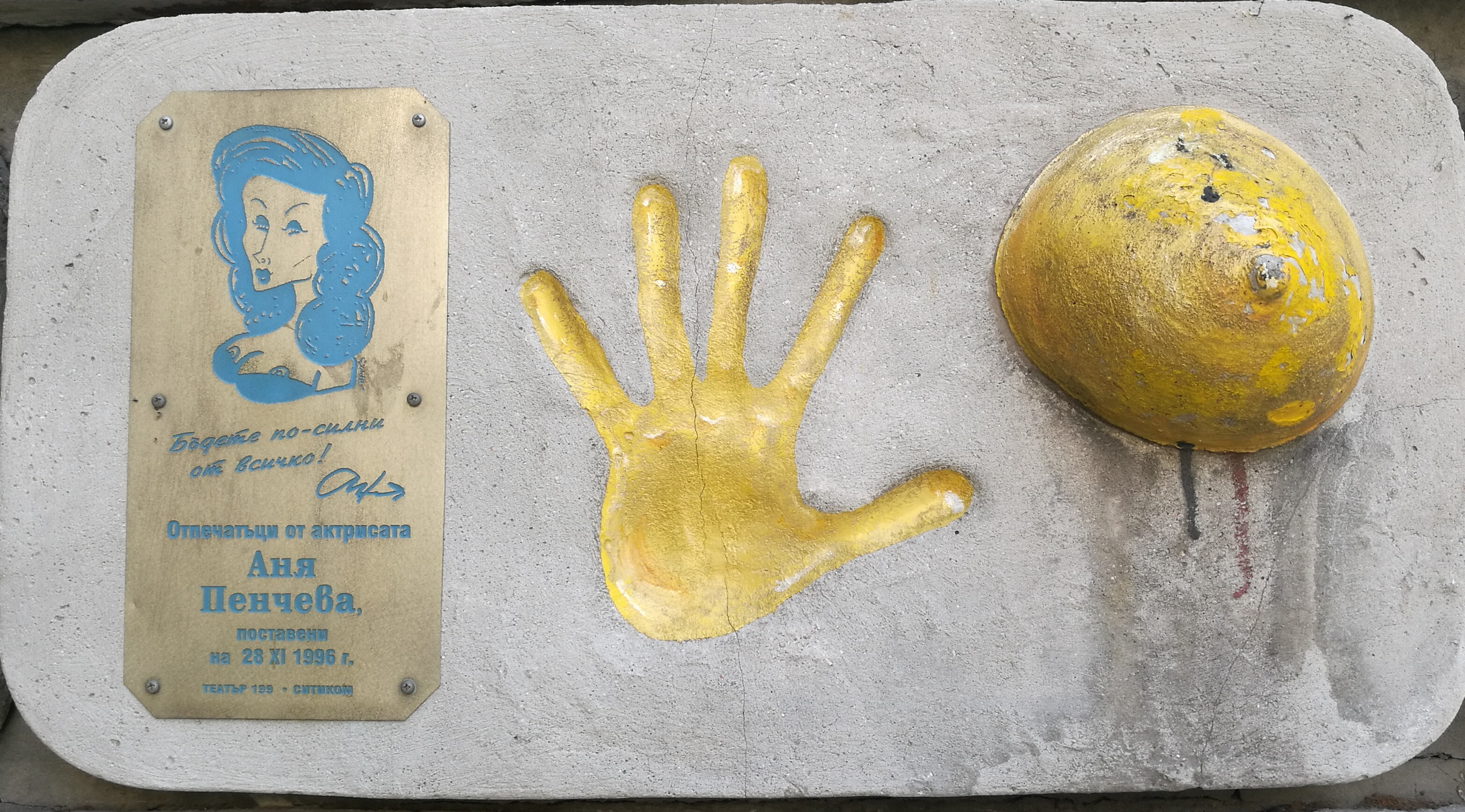 Стената на славата пред Театър 199 - пано с отпечатъци, послание и шарж на Аня Пенчева.